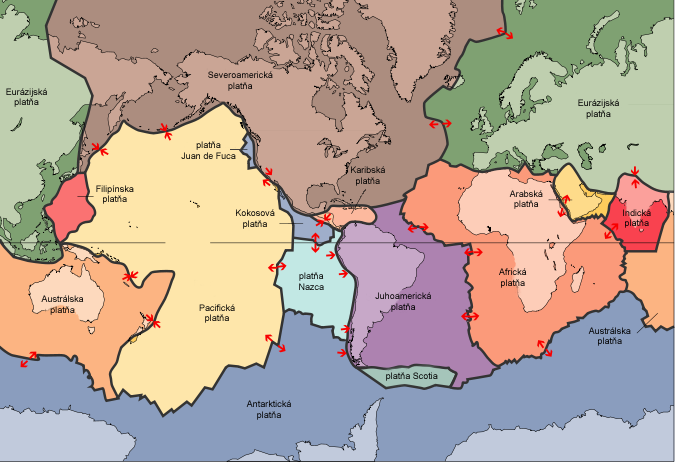 uprava povodne anglickeho obrazku z common Zdroj: z commons sk::Image:Plates tect2 en.svg